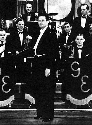 Georg Enders